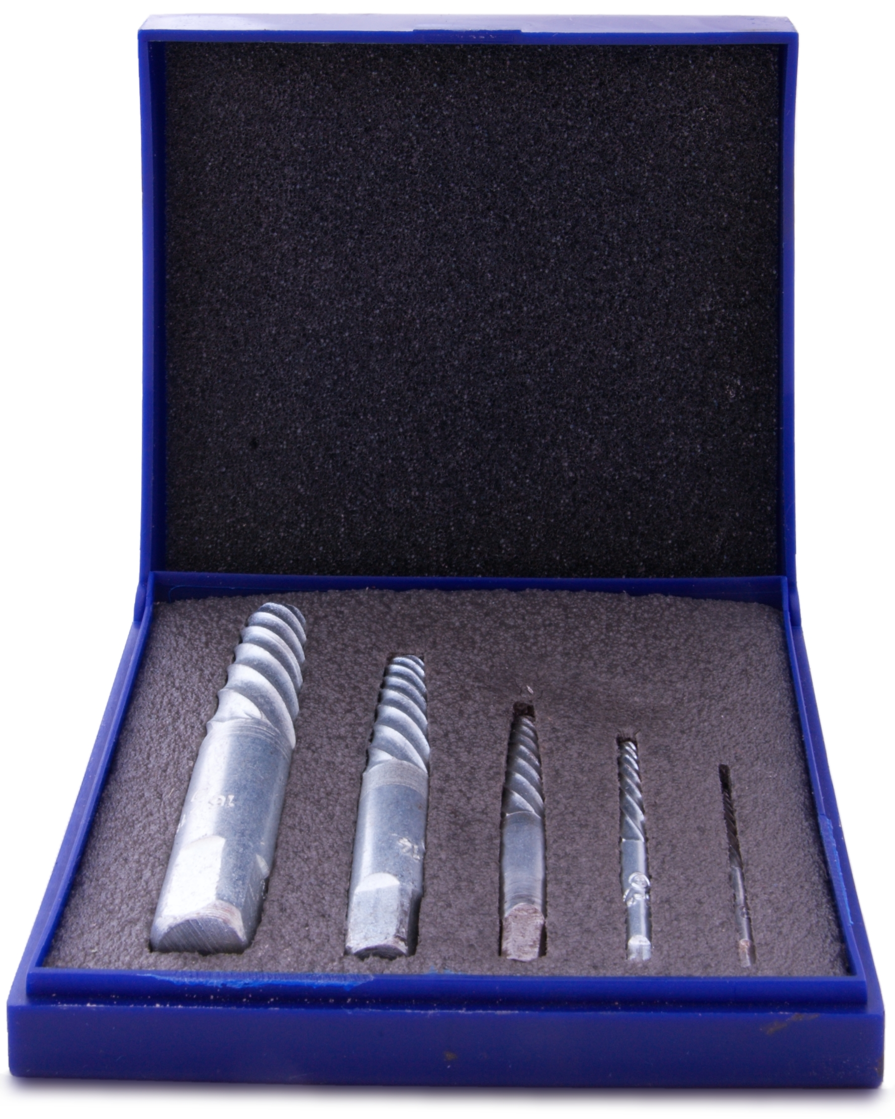 vytáčník